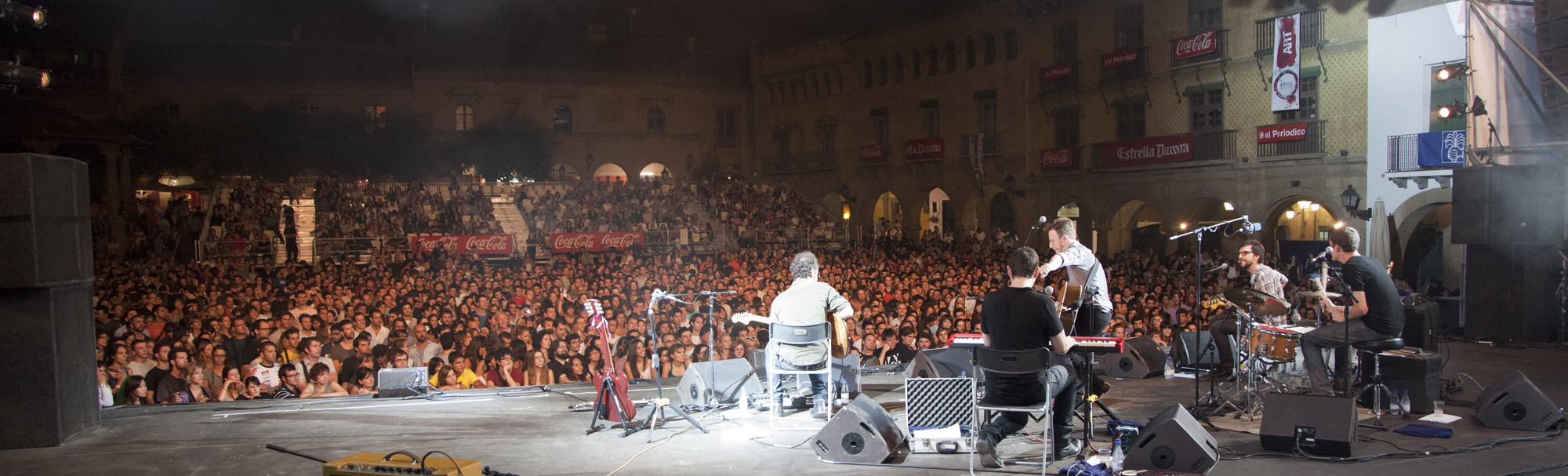 Mishima - Els concerts de l'estiu 2010 , Poble Espanyol (Bcn)